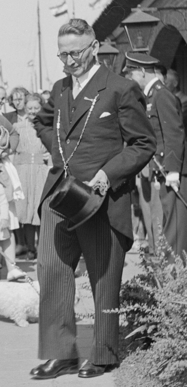 Collectie / Archief : Fotocollectie Van de Poll Reportage / Serie : Het prinselijk gezin in Friesland Beschrijving : Na afmering aan de steiger van hotel Princenhof in Eernewoude wordt het prinseslijk gezin ontvangen door burgemeester Steenhuisen van Tietjerksteradeel (met ambtsketen) Datum : 1947 Locatie : Eernewoude, Friesland Trefwoorden : burgemeesters, honden, koninklijk huis, schepen, steigers Persoonsnaam : Beatrix, prinses, Bernhard, prins, Juliana, prinses, Margriet, prinses, Steenhuisen, F.W. Fotograaf : Poll, Willem van de Auteursrechthebbende : Nationaal Archief Materiaalsoort : Negatief (zwart/wit) Nummer archiefinventaris : bekijk toegang 2.24.14.02 Bestanddeelnummer : 255-7429